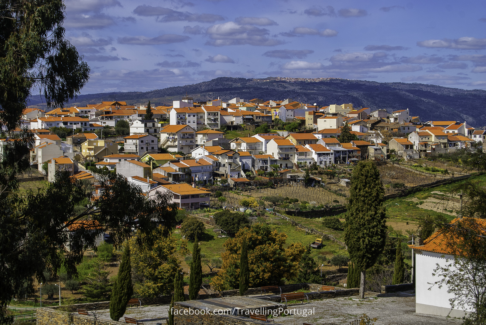 Vila Nova de Foz Côa